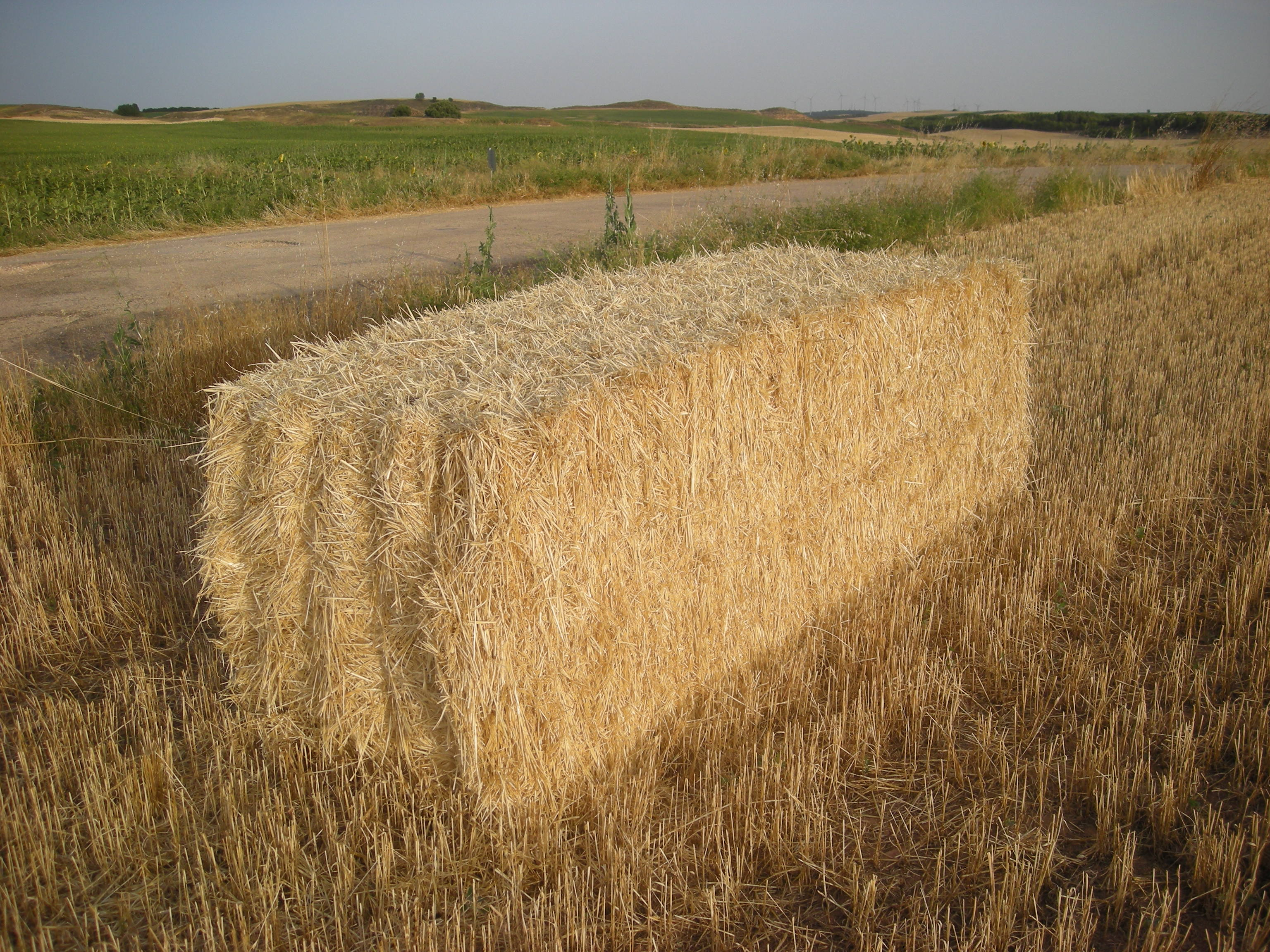 Alpaca de paja, Cuenca, España.